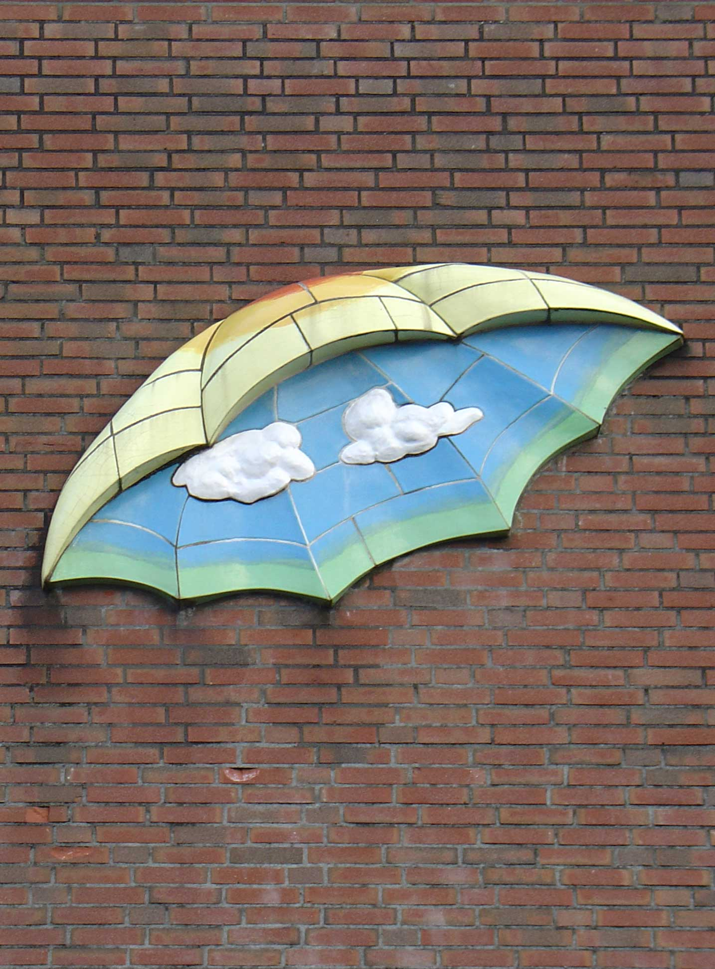 Paraplu's (dl. 2) door Willem Caspers gevel Mensitenplein/Korte Hemenweg (1997)